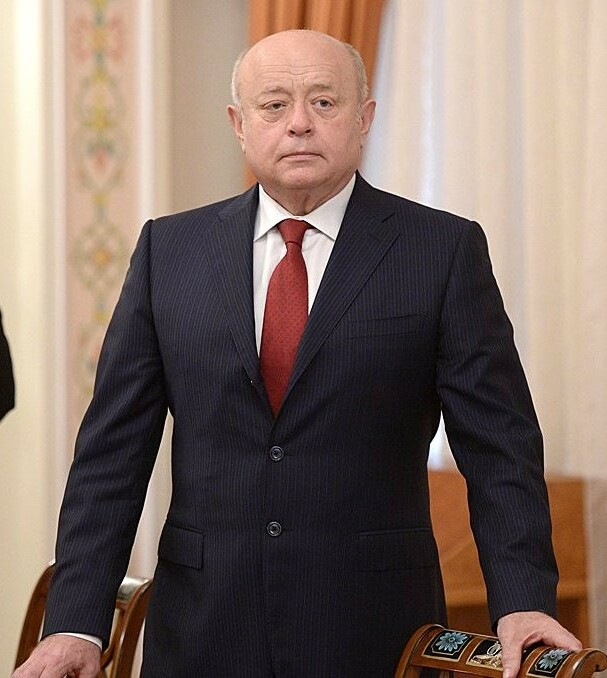 директор Службы внешней разведки Российской Федерации Михаил Ефимович Фрадков